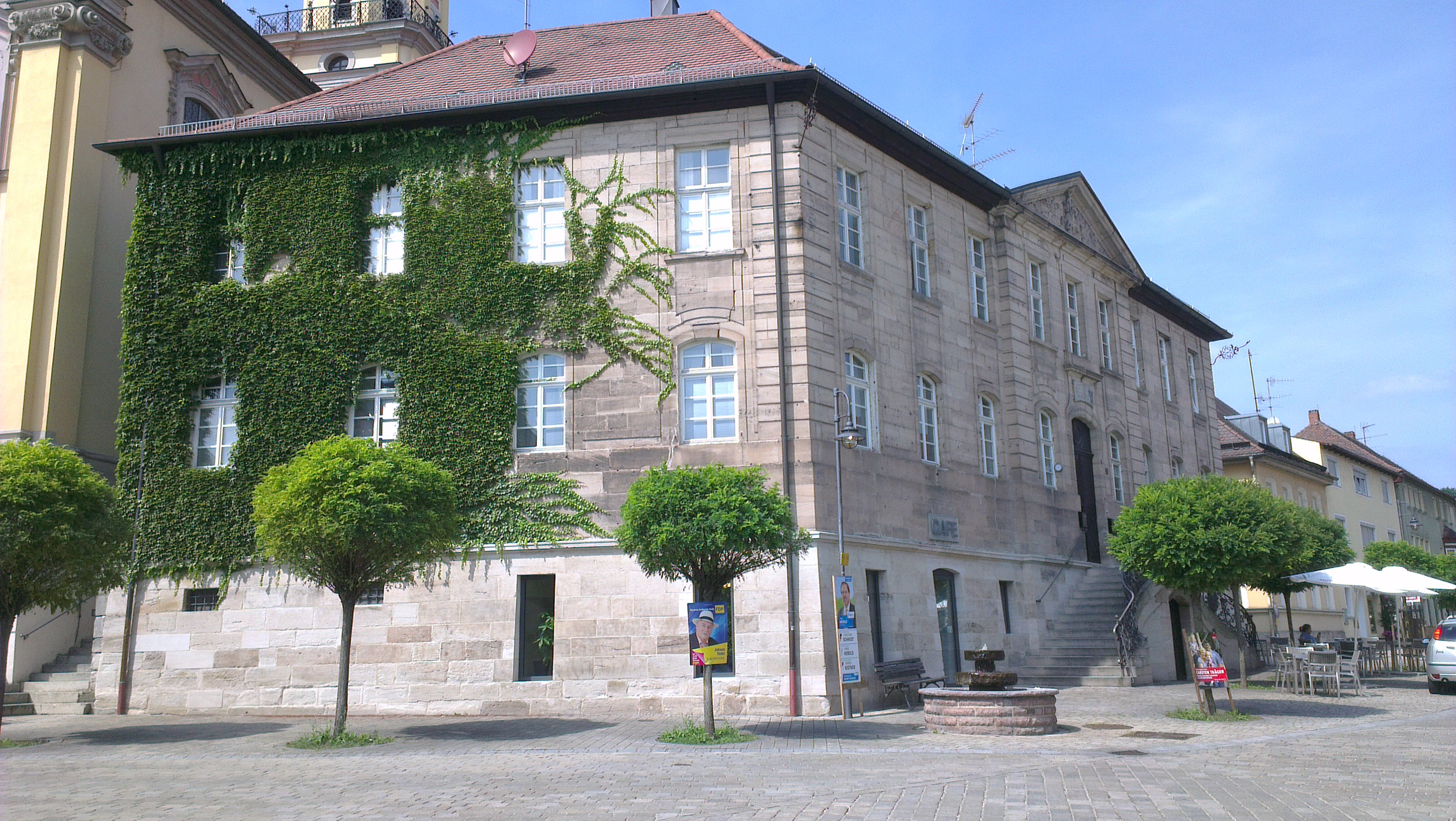 Wilhermsdorf - Ehemaliges Verwaltungsgebäude des Ritterkantons Altmühl - Ritterhaus - Ansicht von Südost